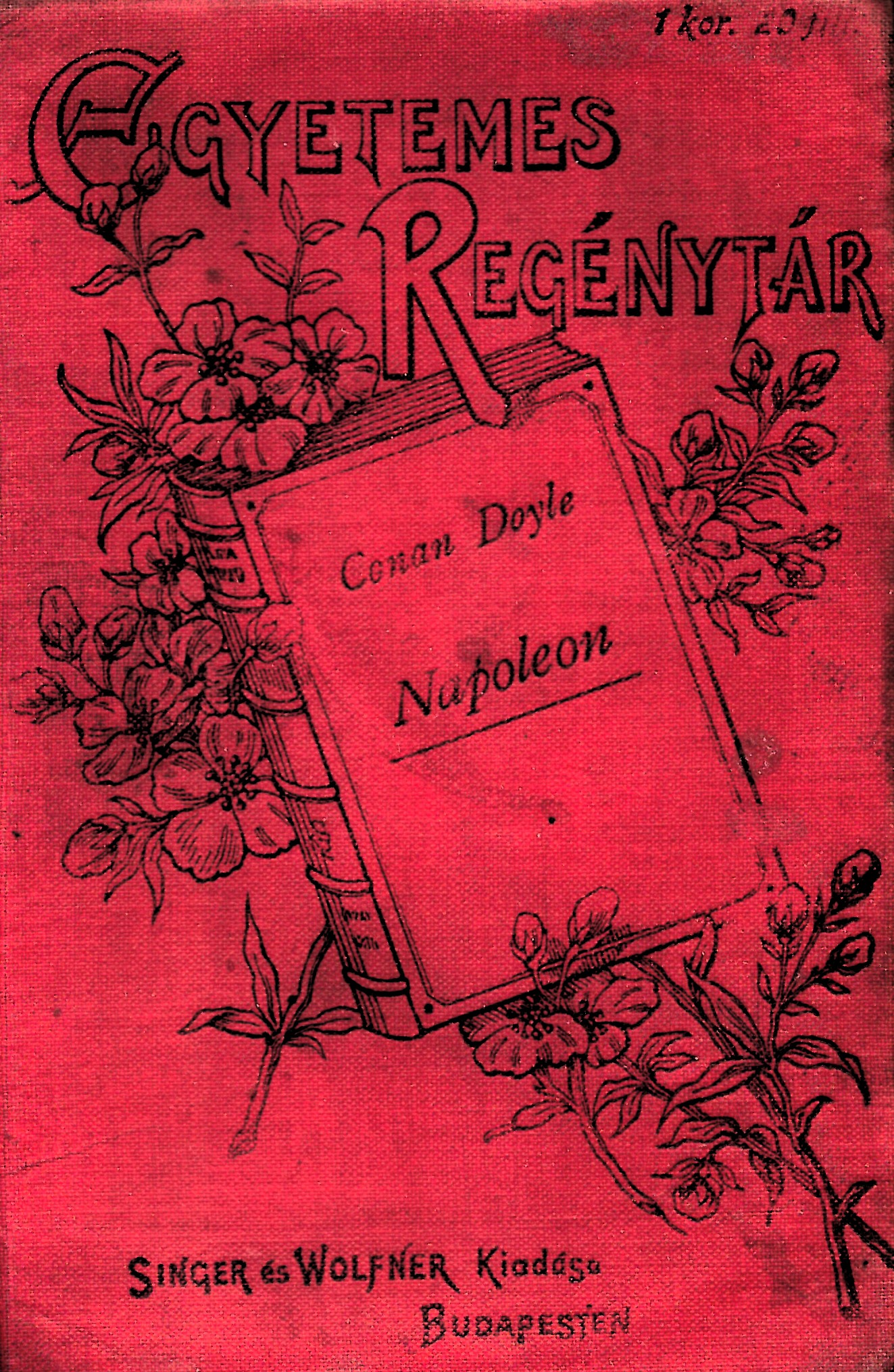 Arthur Conan Doyle (1859-1930): Napoleon (1911)